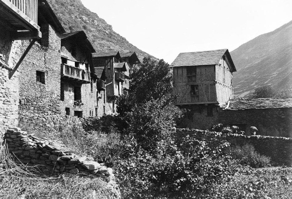 Imatge